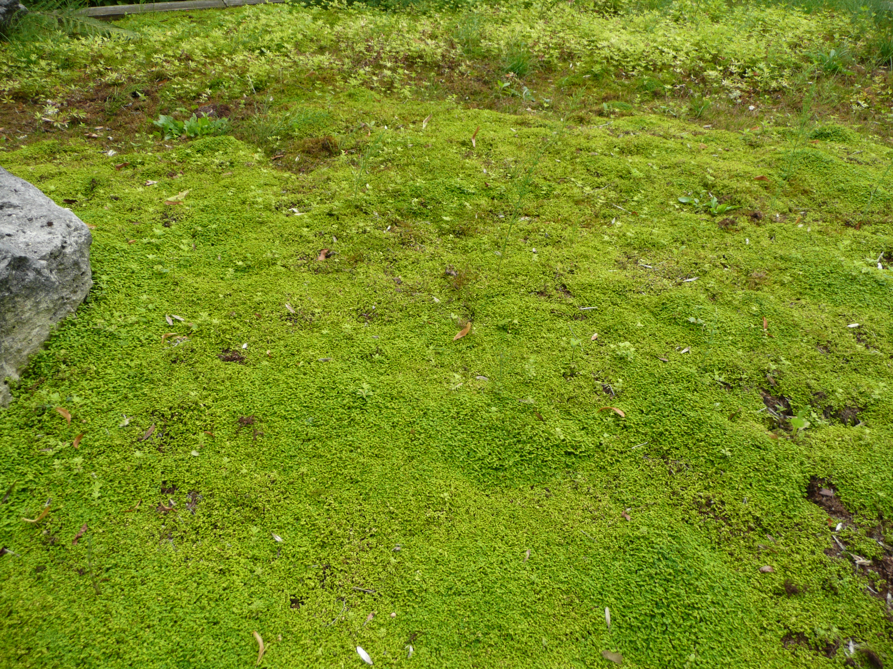 Soleirolia soleirolii in Jardins de Valloires Map: 50° 20' 50" N 01° 49' 11" E